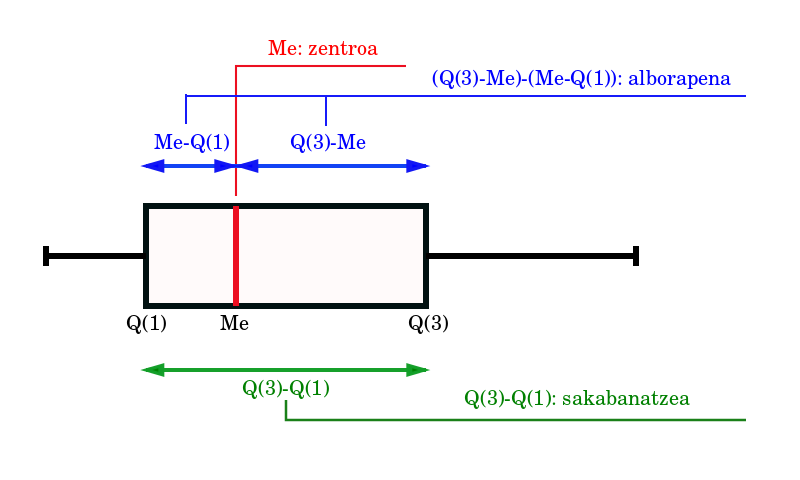 Kaxa-diagramaren interpretazioa.